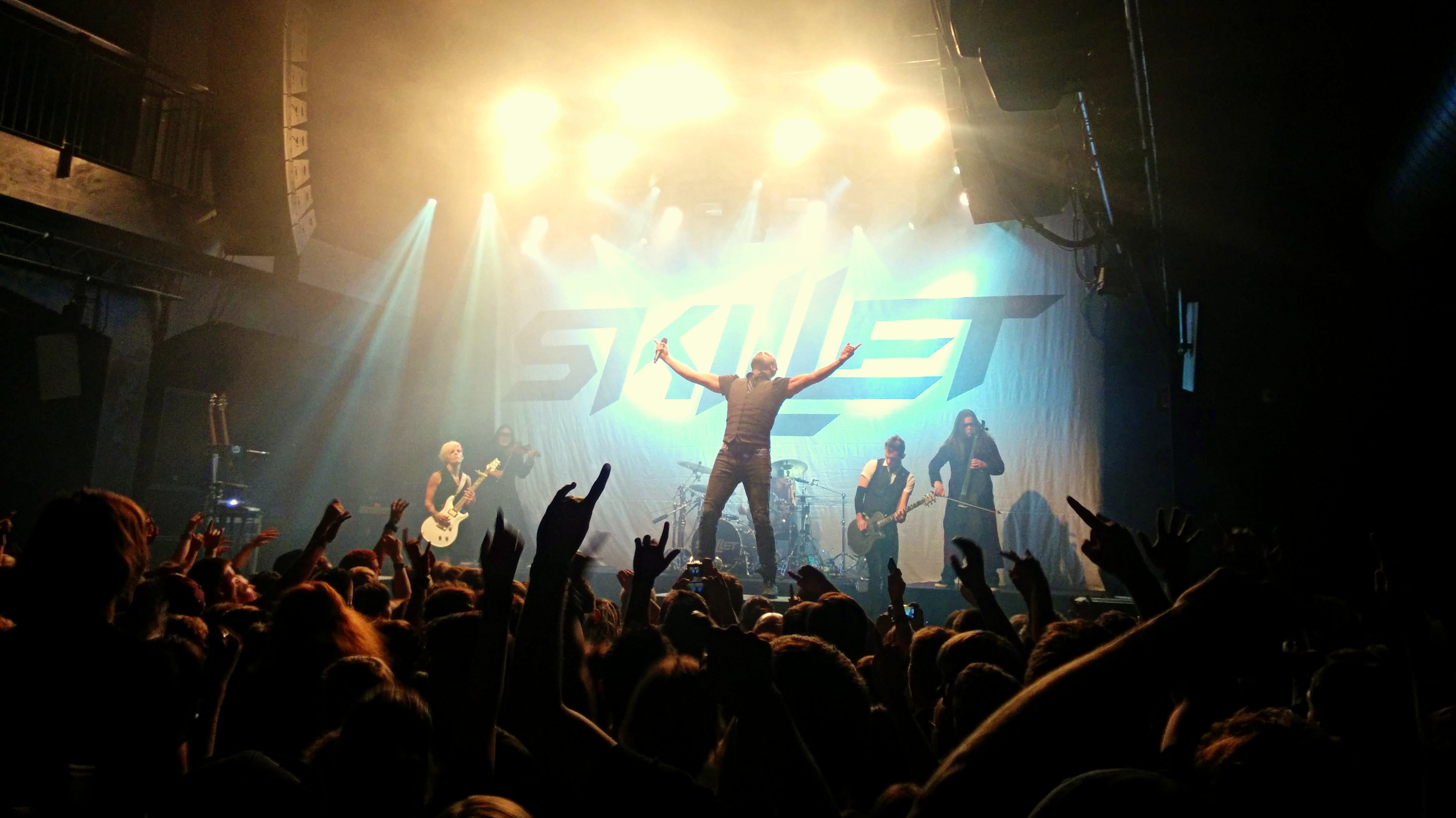 Skillet am 20. Oktober 2014 im Komplex457 in Zürich